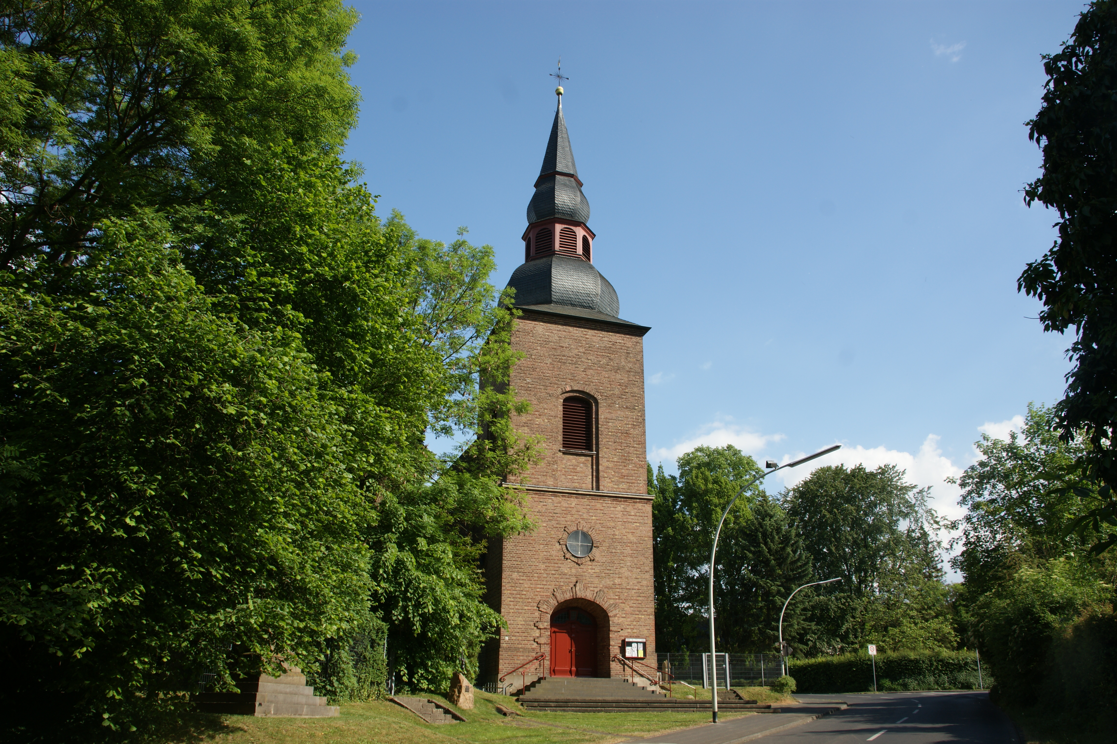 alte katholische Kirche Sankt Mauritius Frechen-Bachem